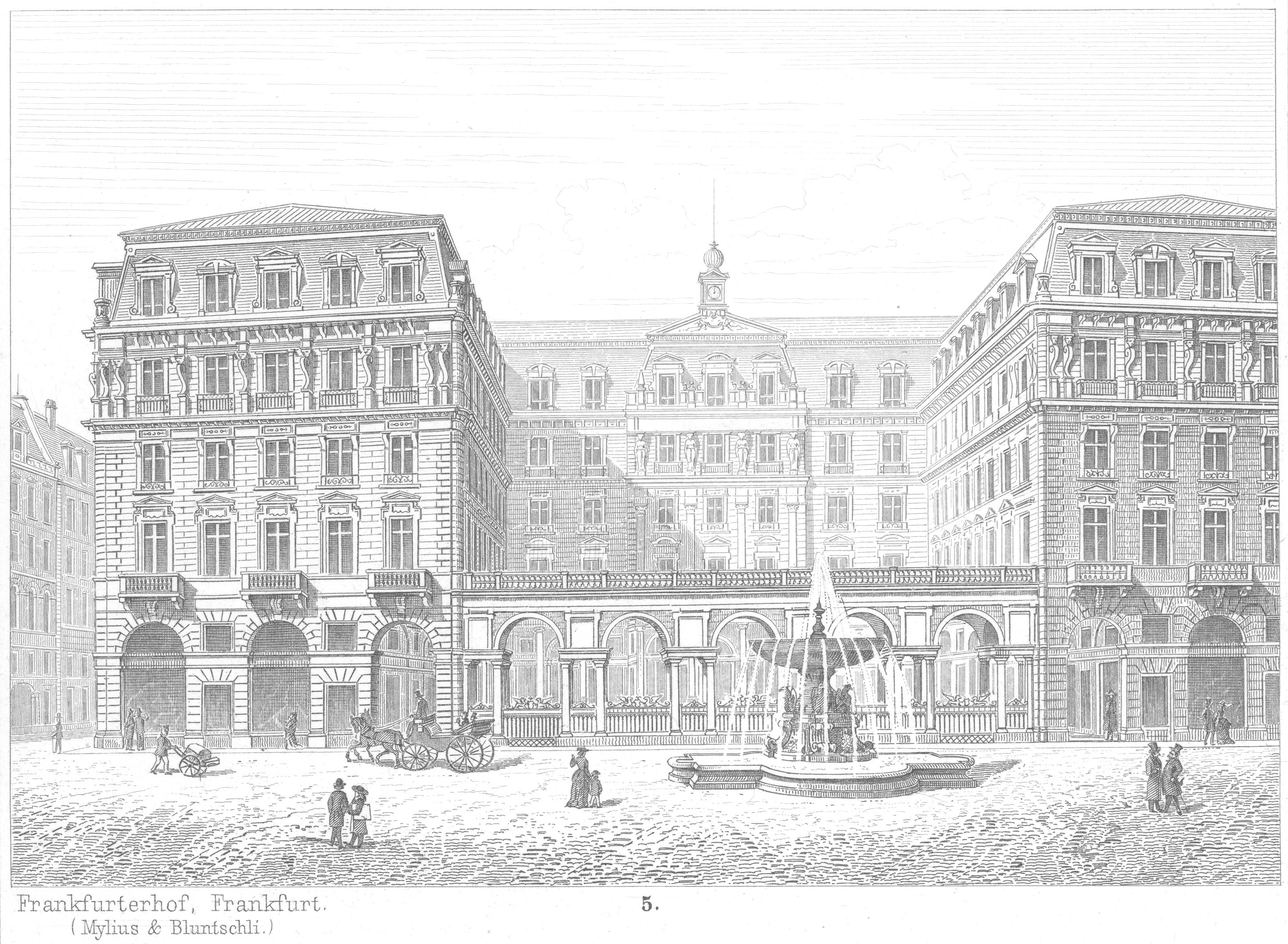 Frankfurter Hof, ca. 1876-1878, Frankfurt am Main, Architekten: Karl Jonas Mylius und Alfred Friedrich Bluntschli)